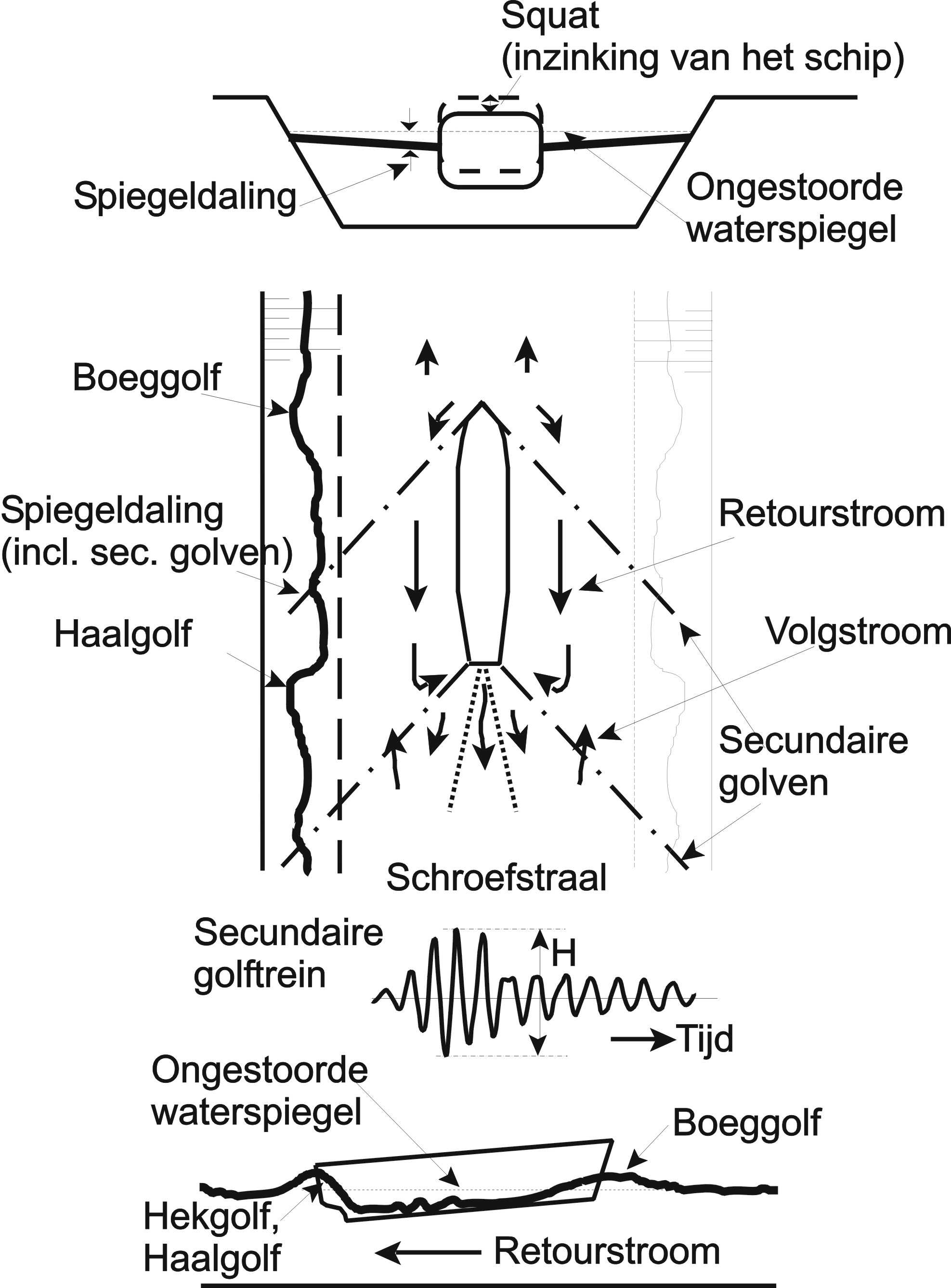 Namen van de golf- en stgromingsverschijnselen rond een varend schip in een kanaal